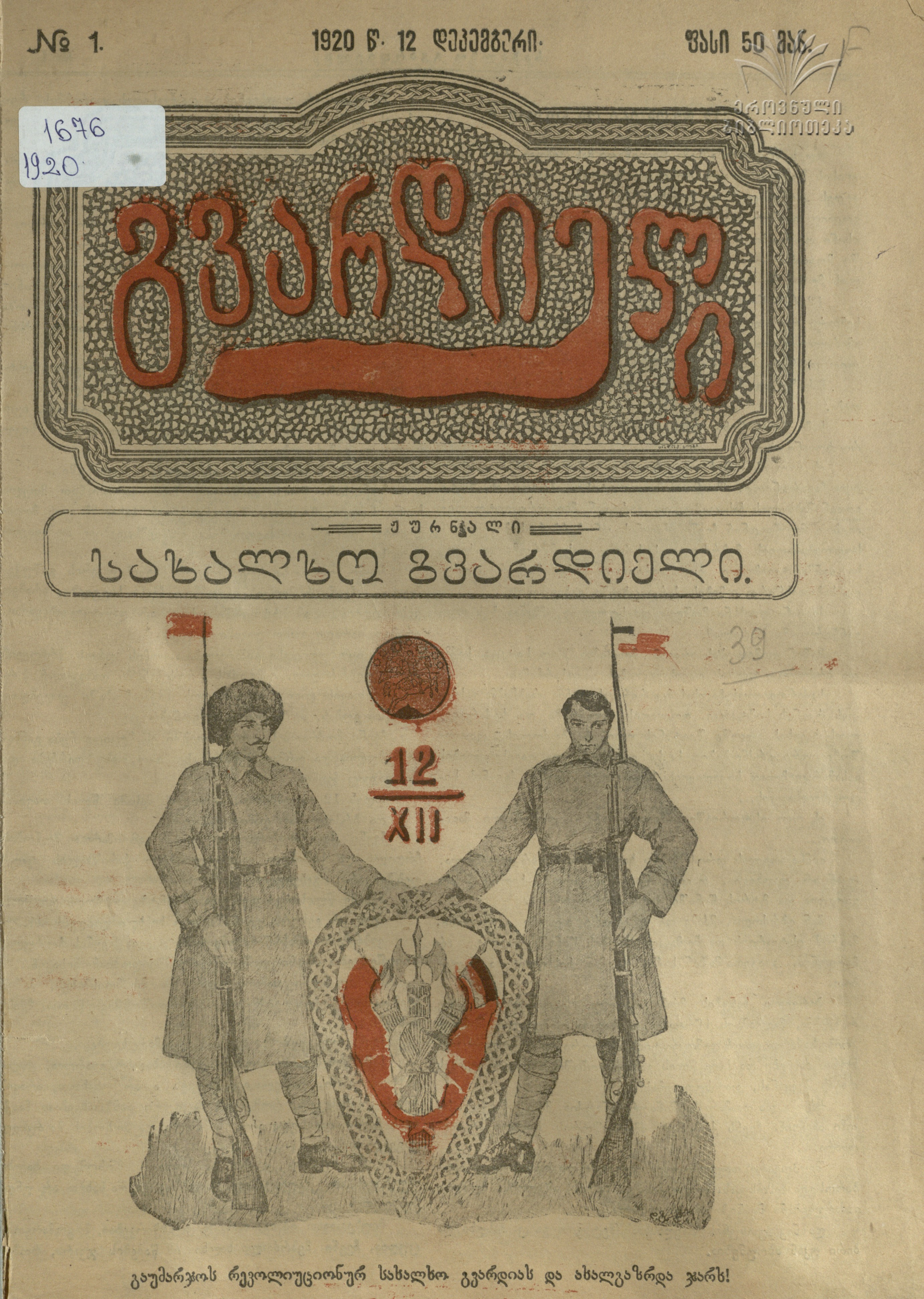 ჟურნალი „სახალხო გვარდიელი“ N1 1920 წ.